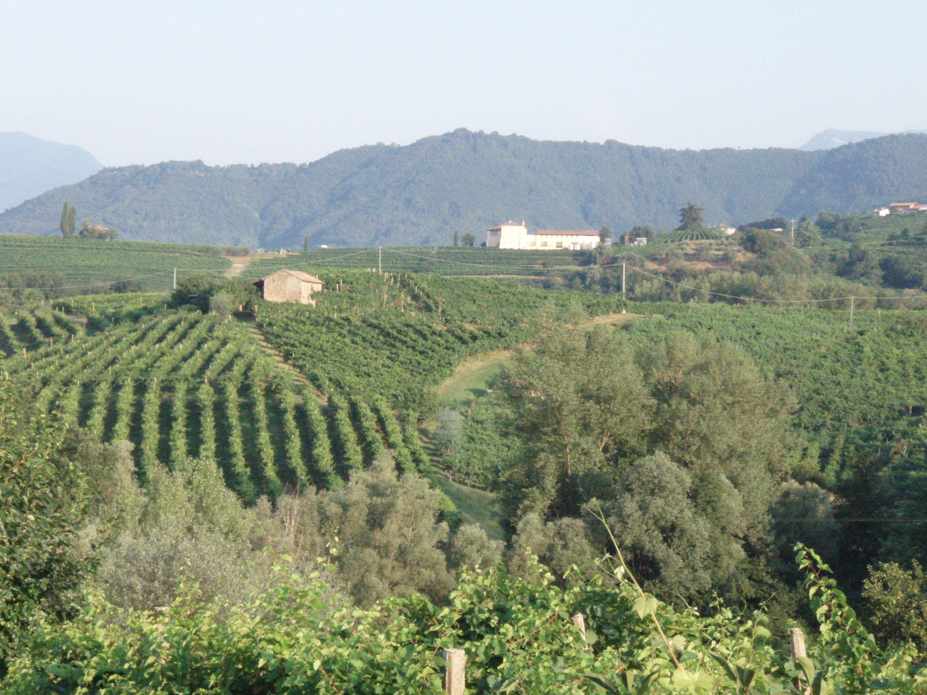 San Giovanni di Valdobbiadene